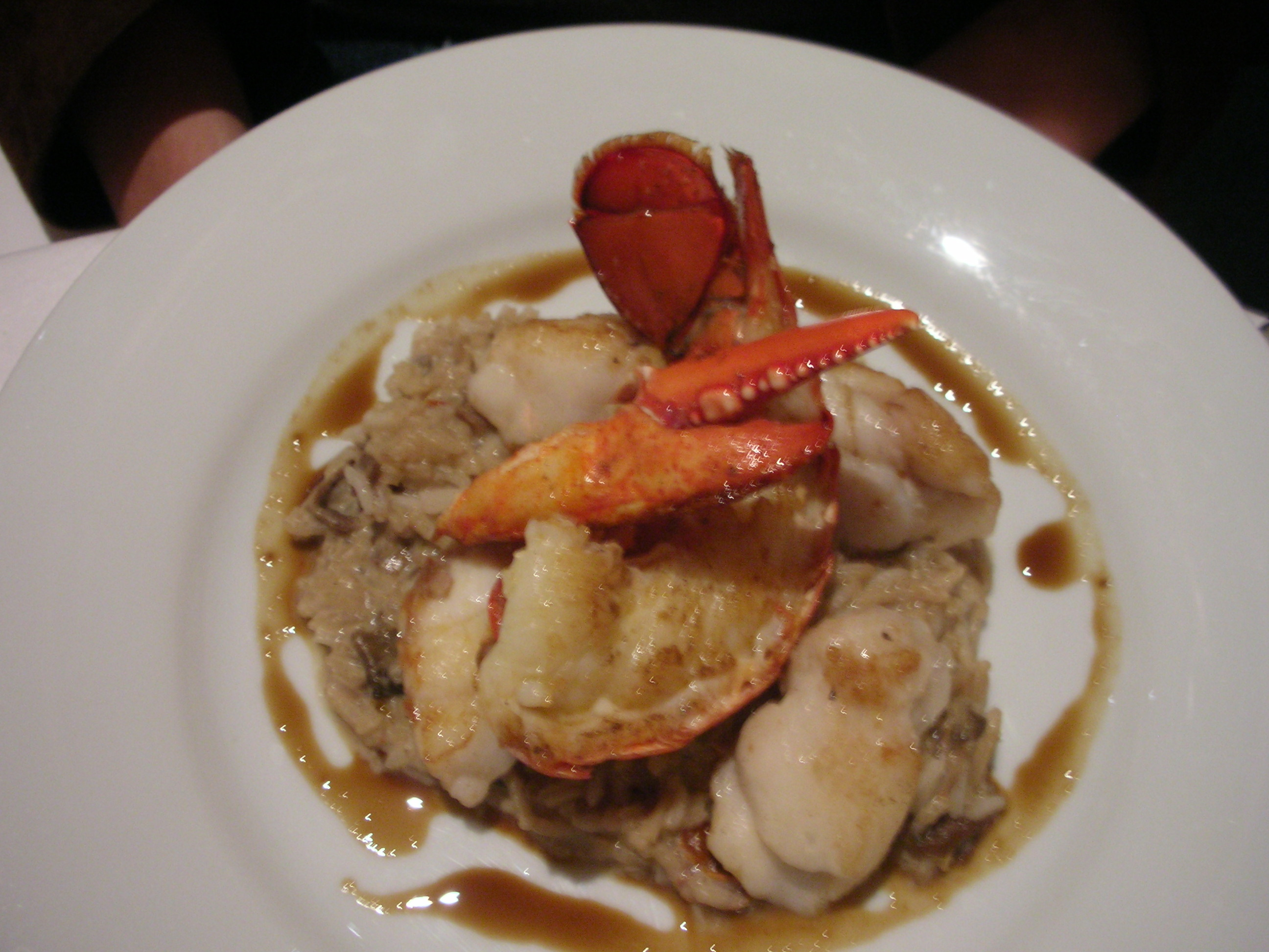 Fricassée de homard et lotte, caramel de homard - Les Allobroges October 2006